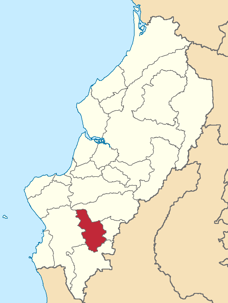 Mapa localizador del cantón en Manabí, Ecuador